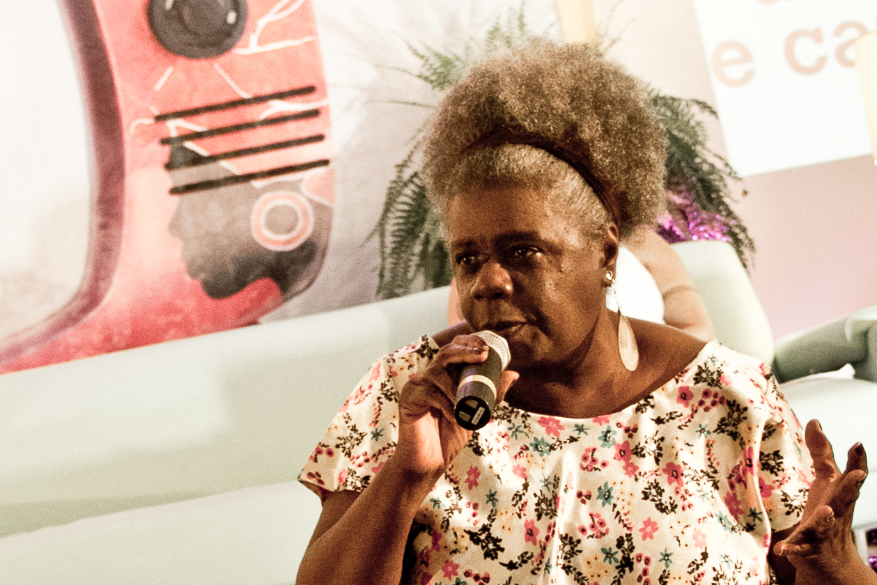 A escritora Conceição Evaristo durante debate no Festival Latinidades 2013